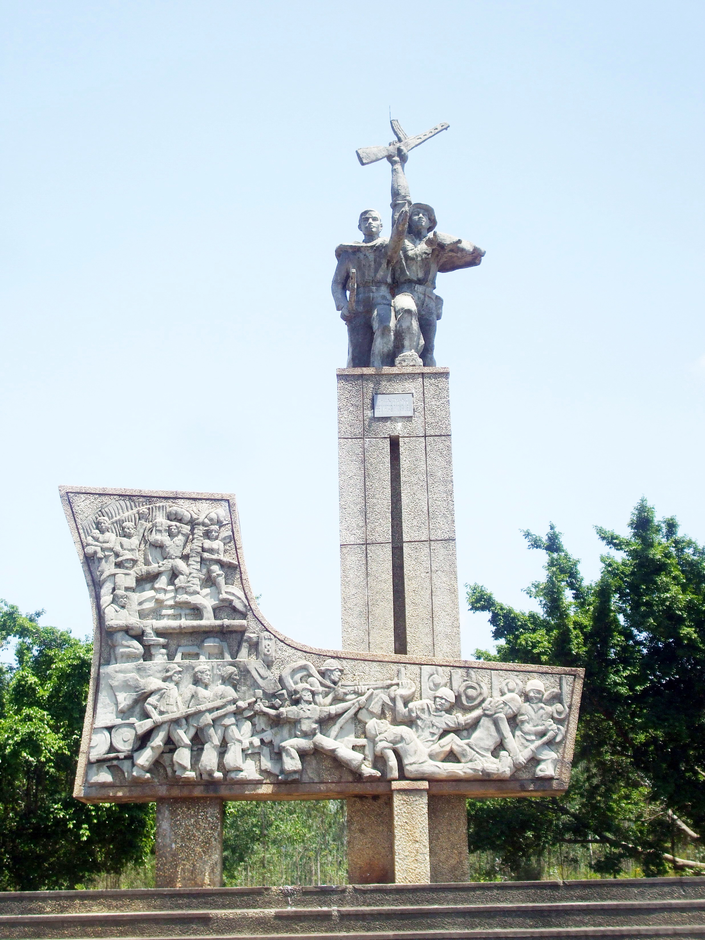 Tượng đài kỷ niệm trận Dương Liễu - Đèo Nhông được dựng tại đèo Nhông; thuộc địa bàn huyện Phù Mỹ, tỉnh Bình Định, Việt Nam.